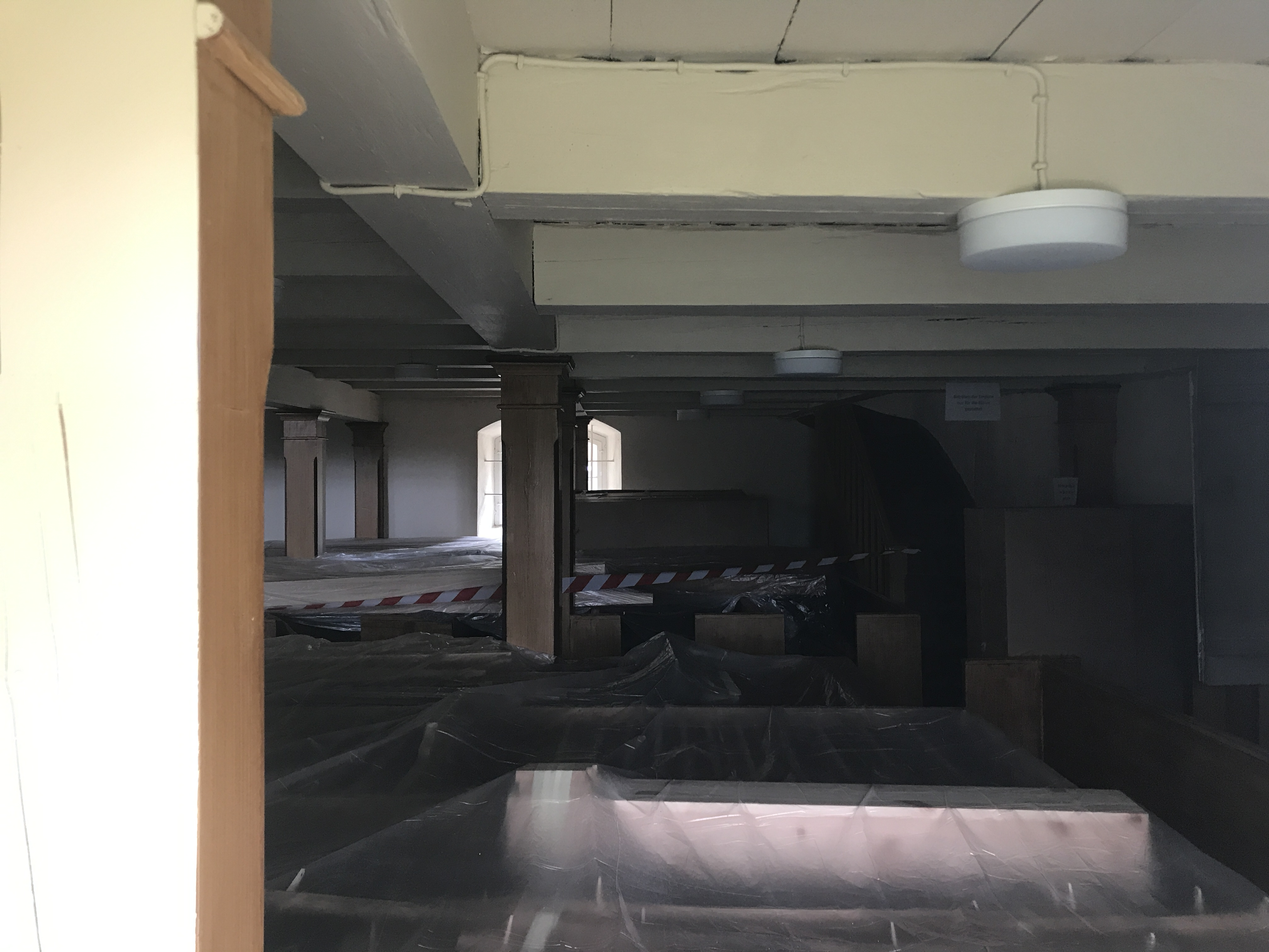 Die Dorfkirche Frankenfelde ist eine Feldsteinkirche aus der zweiten Hälfte des 13. Jahrhunderts. Im Innenraum steht unter anderem ein polygonaler Kanzelkorb aus der Zeit um 1700.